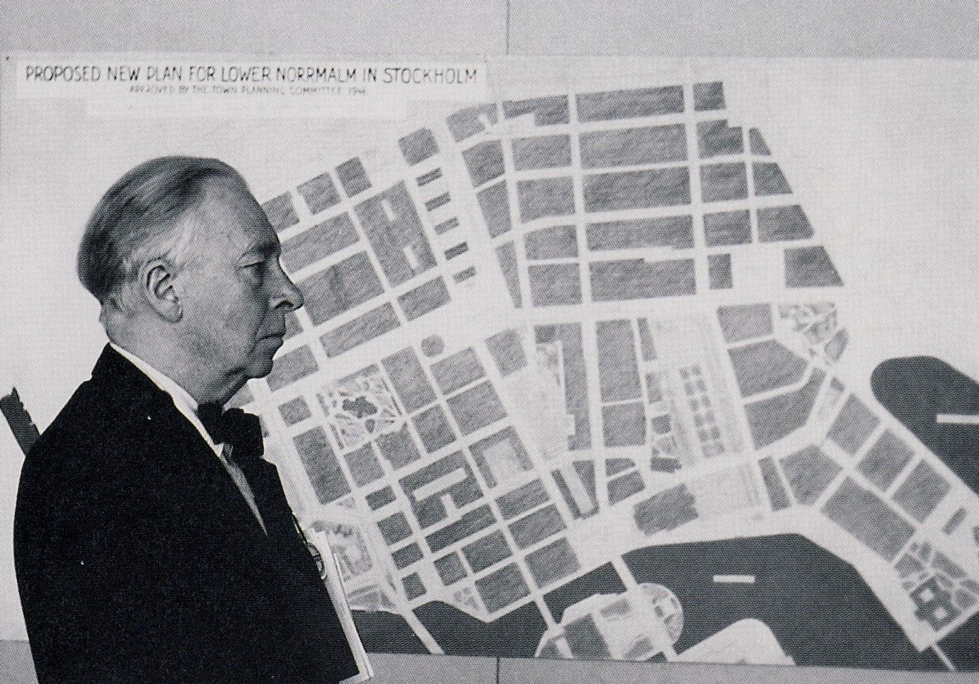 Arkitekt Tage William-Olsson framför planen för Nedre Norrmalm 1946